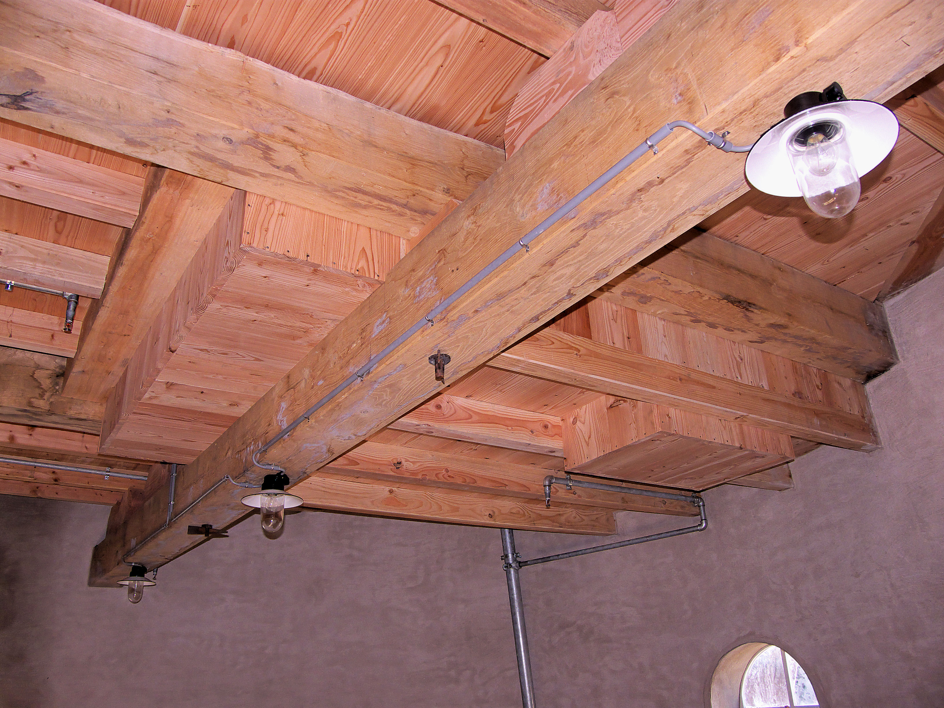 Molen De Koe Ermelo tussenvloer met pelsteen